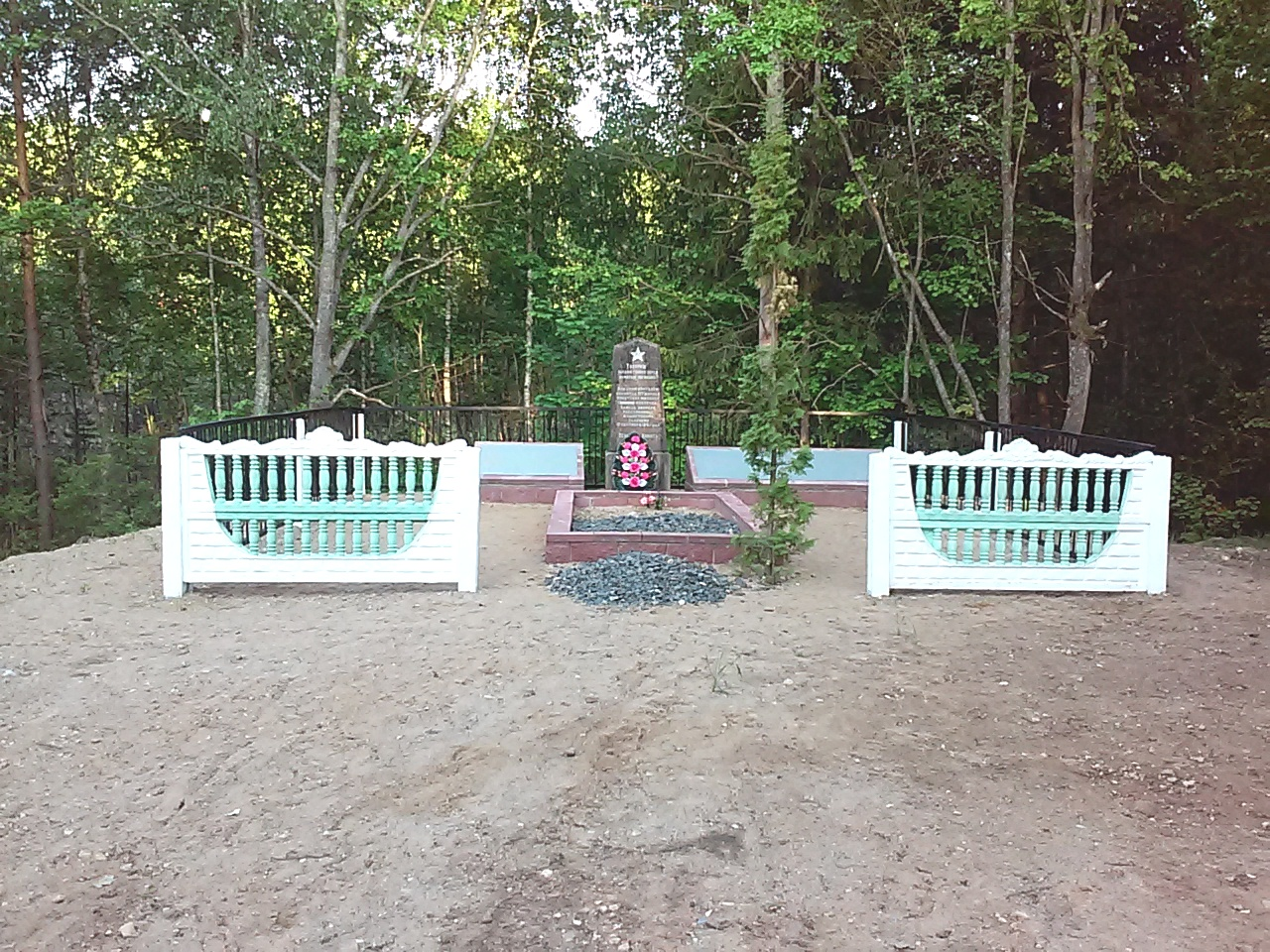 Памятник евреям деревни Камень Лепельского района, убитым нацистами 17 сентября 1941 года. Находится примерно в полукилометре севернее деревни, после кладбища, слева от дороги в урочище Борки